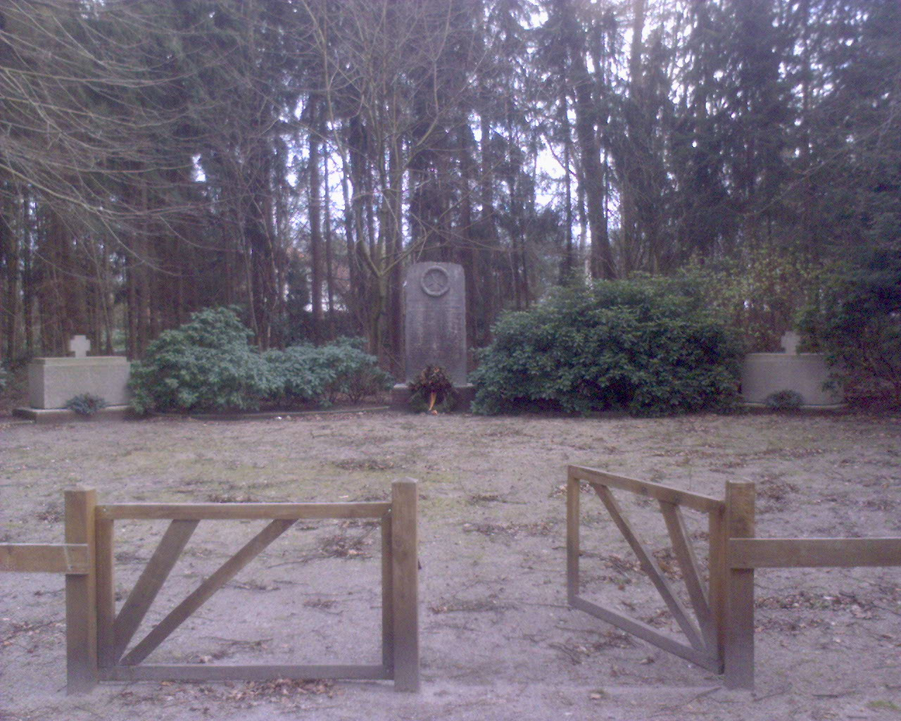 Dringenburger Gedenkstätte